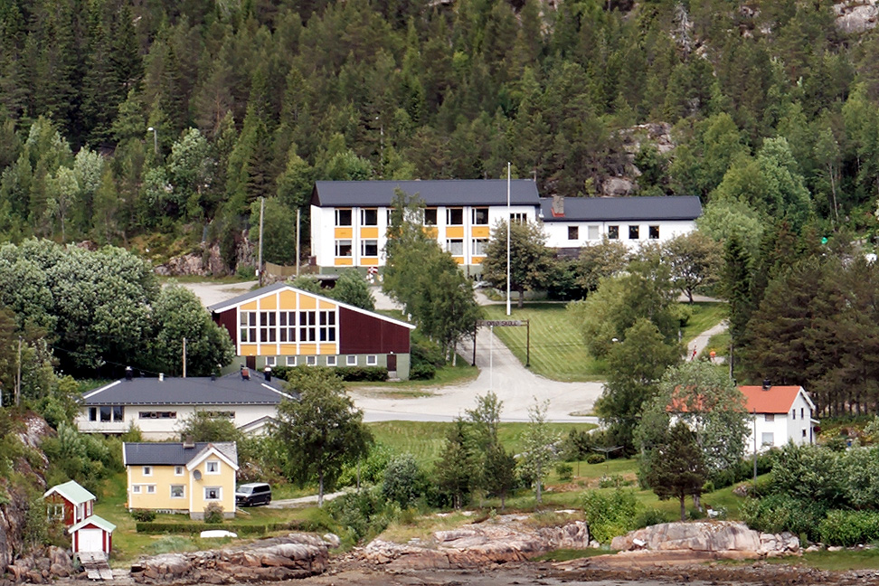 Oplø Oppvekstsenter, Salsbruket, Nærøy kommue, Norway